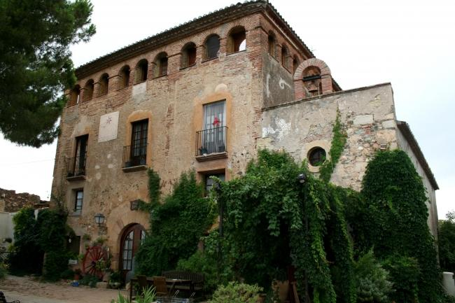 Mas del Burgar amb la capella